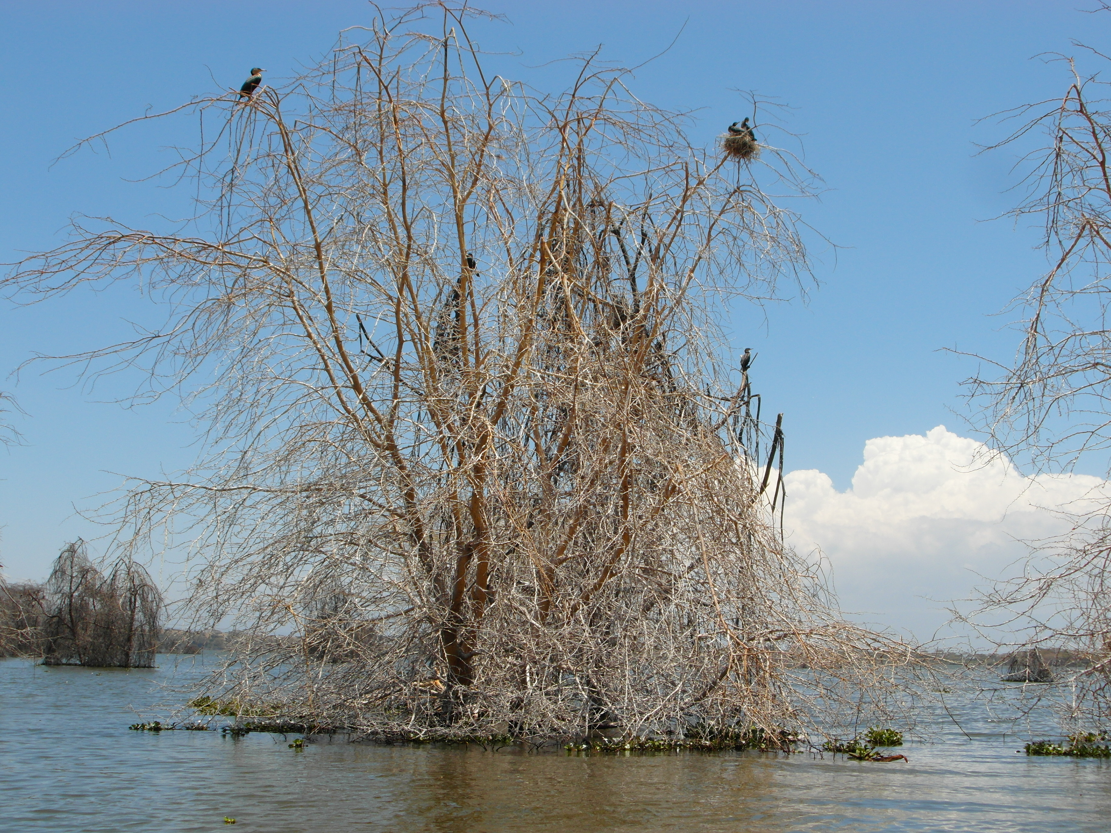 Kenya 2013. Lake Naivasha.